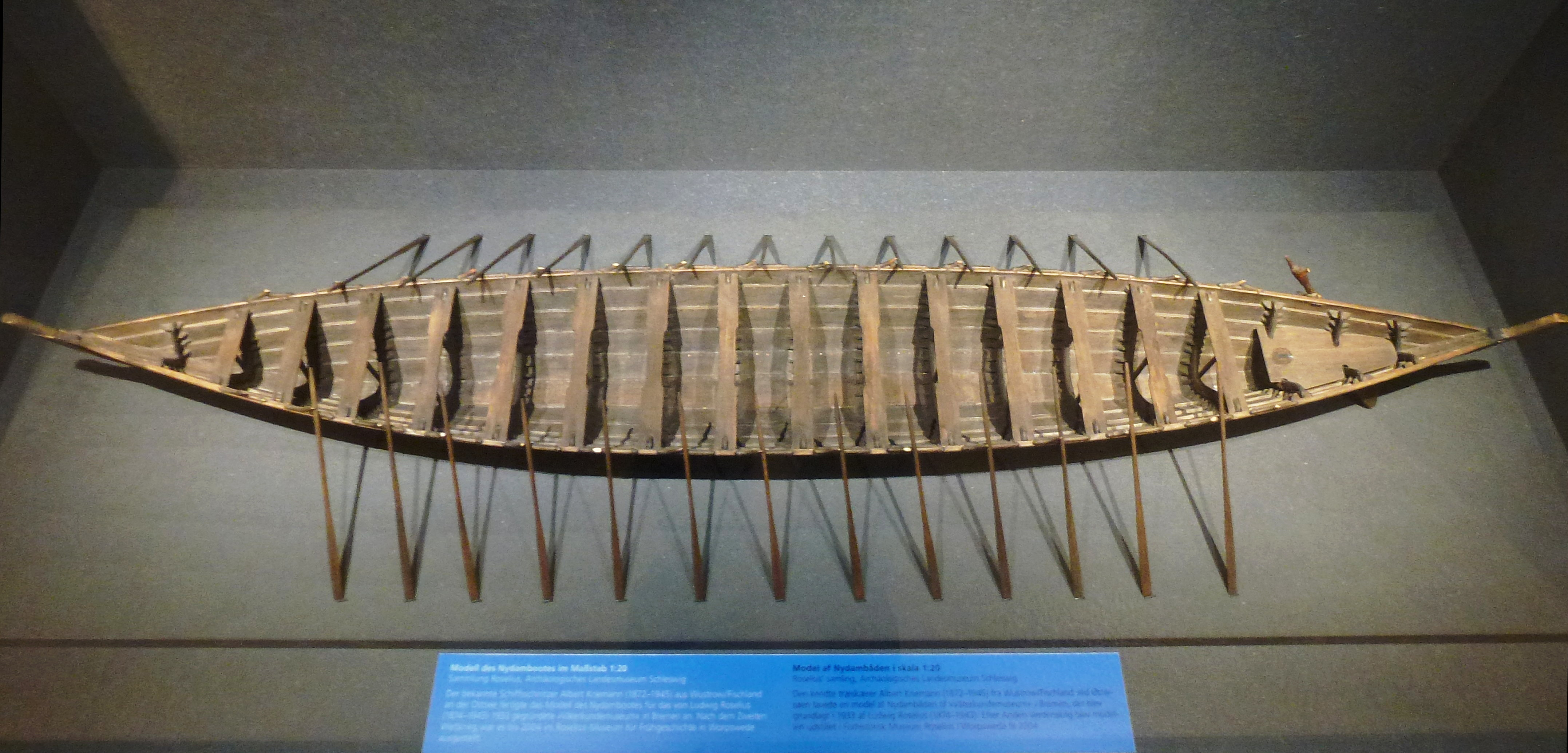 Das Nydam-Boot Modell 1:20 gefertigt von Albert Kriemann (1872-1945)